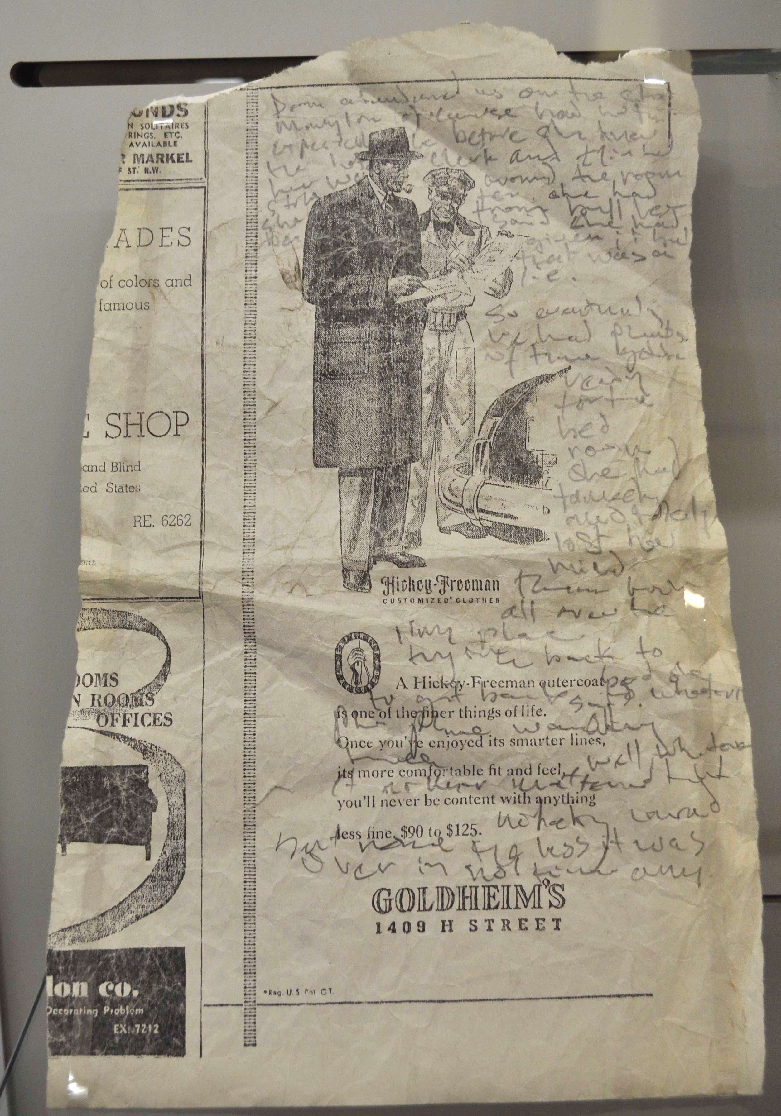 Reproduction d'une lettre écrite par Jack Kerouac sur un morceau de journal. Exposition "Sur la route deJack Kerouac : L'épopée, de l'écrit à l'écran" (16 mai - 19 août 2012) au Musée des lettres et manuscrits de Paris.